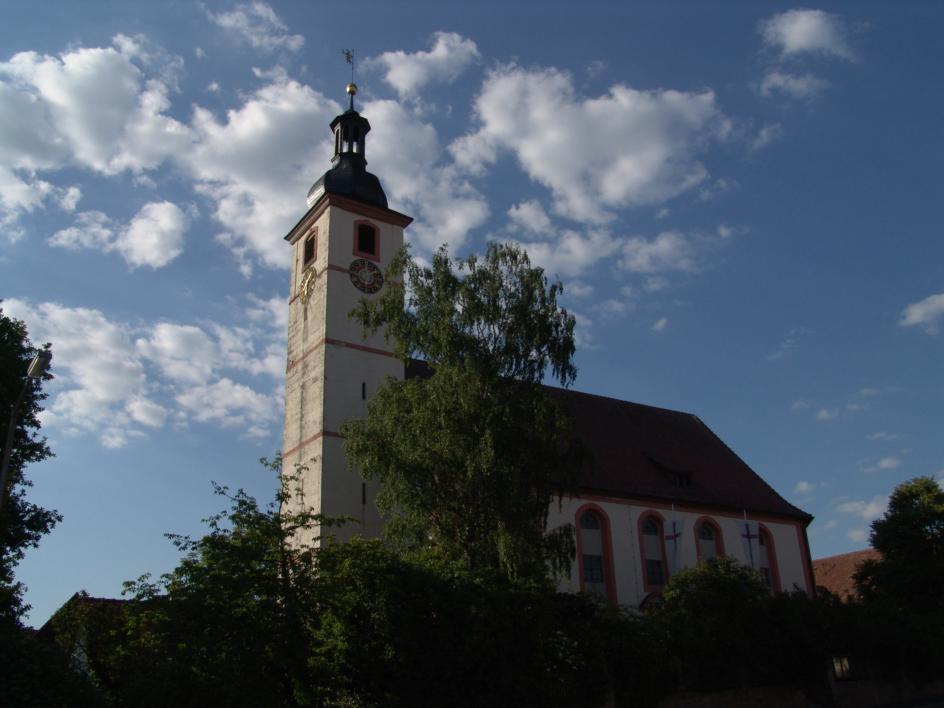 evang.-luth. Kirche St. Peter und Paul in Gerhardshofen